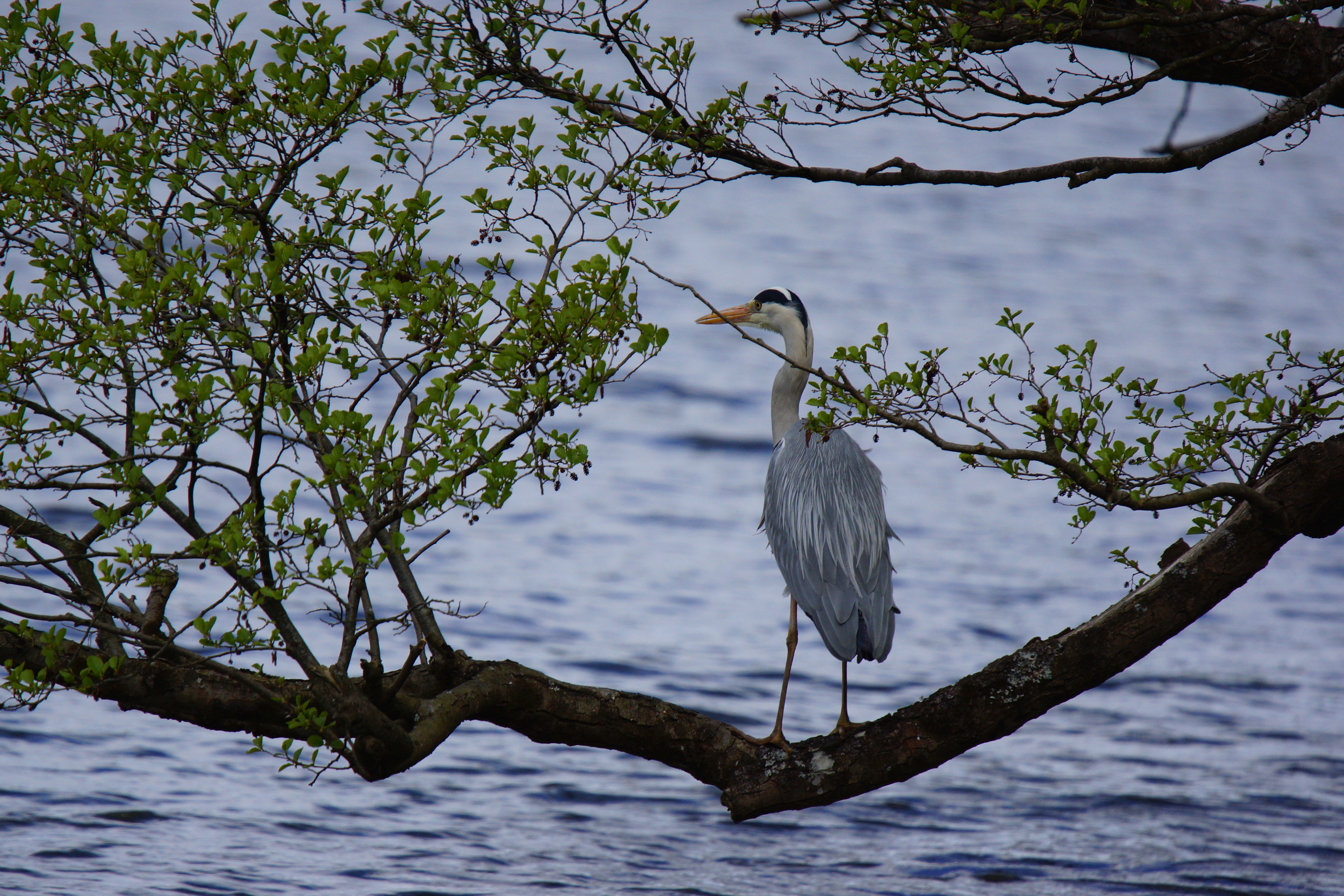 Graureiher im Ansitz an der Havel im Naturschutzgebiet Kleine Schorfheide in Brandenburg